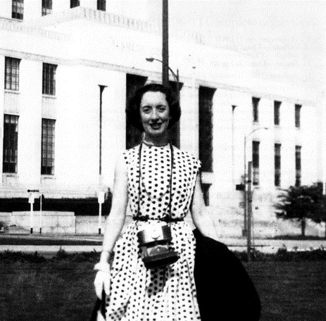 Demessieux de camarografa durante una gira en Estados Unidos.